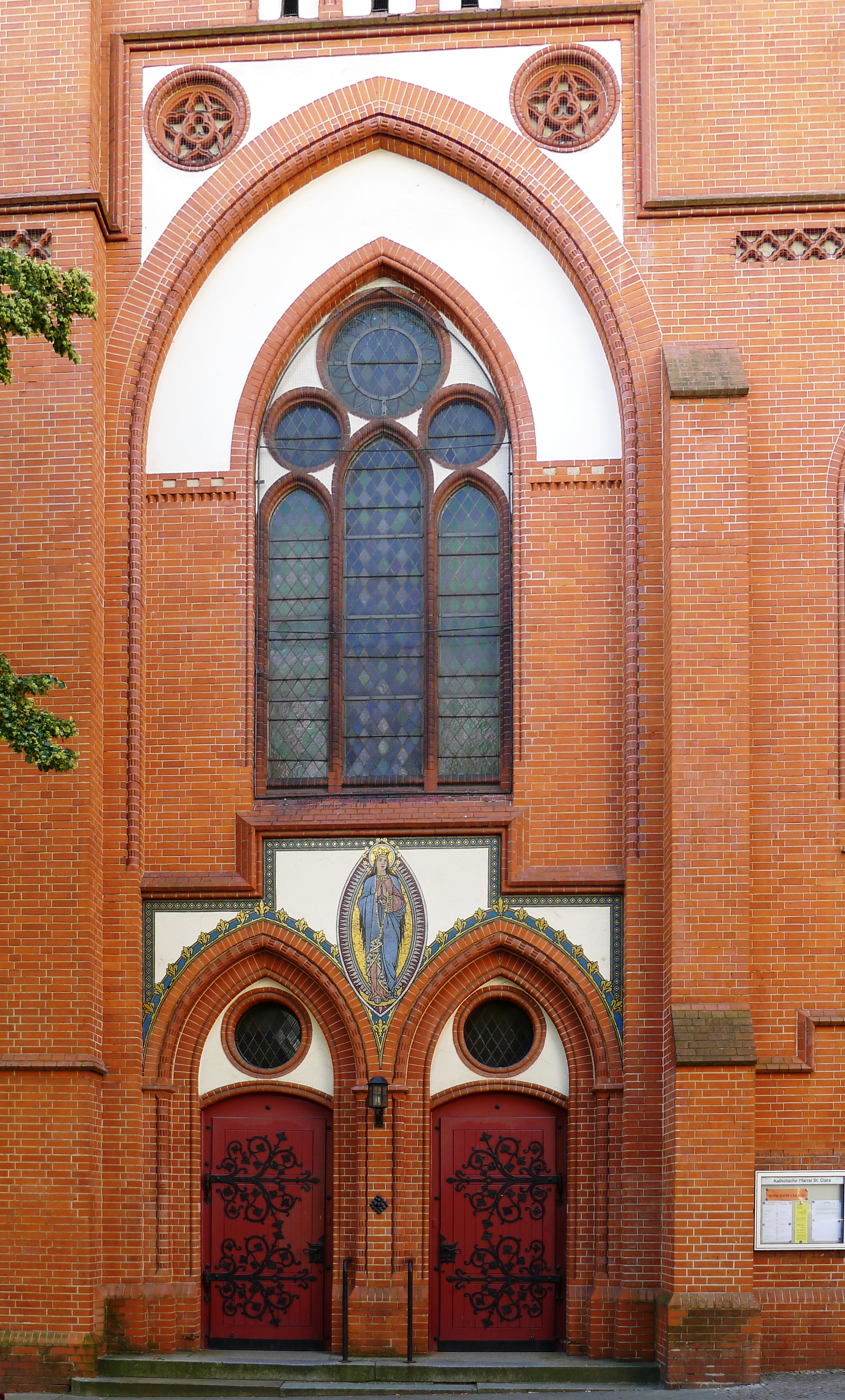 Haupteingang der Kirche